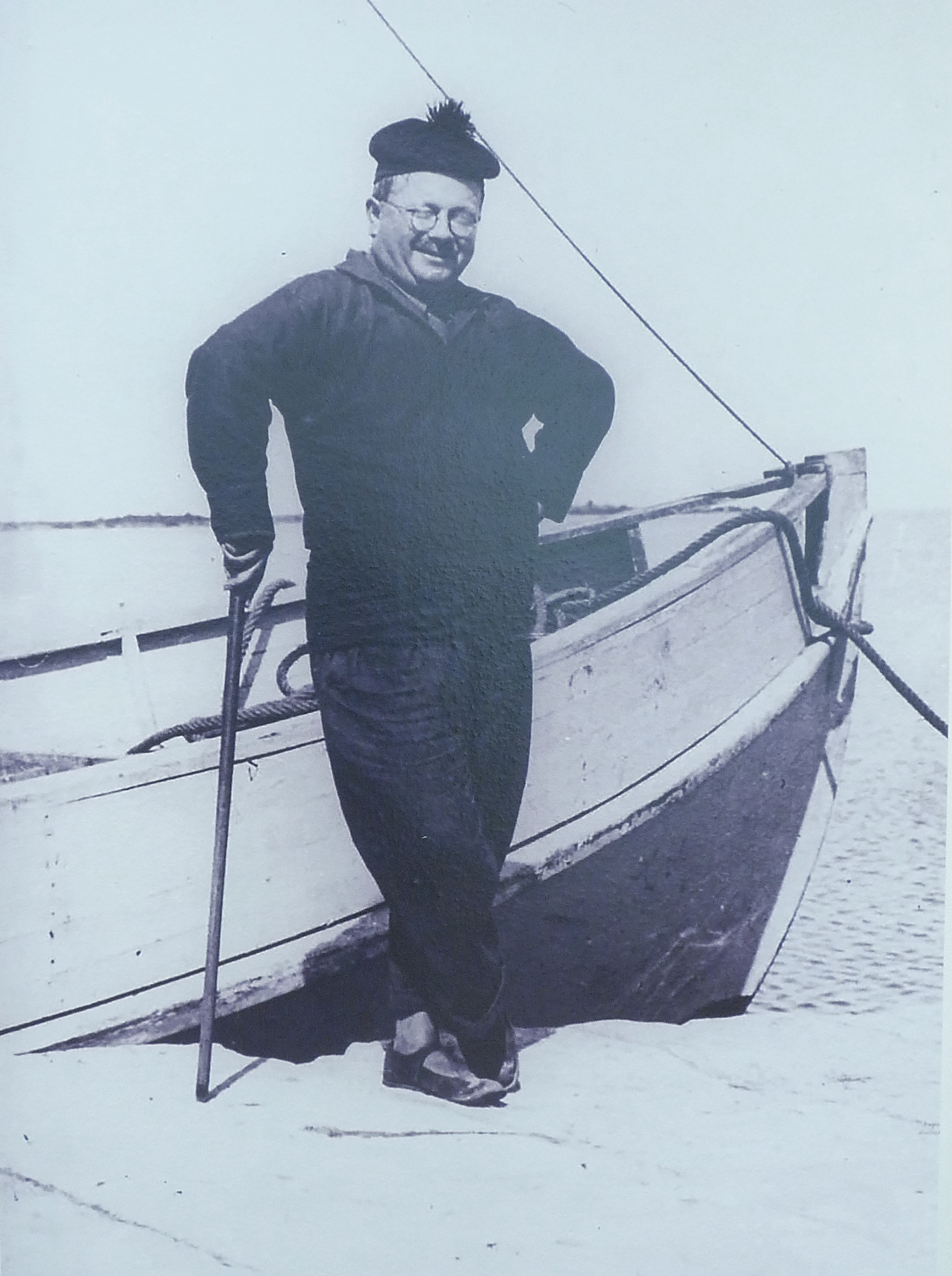 Pierre-André Farcy dit Andry Farcy, conservateur du musée de Grenoble de 1919 à 1949. Exposition du 26 juin au 24 novembre 2019 sur sa carrière et les oeuvres d'artistes de renom qu'il a fait rentrer au musée.